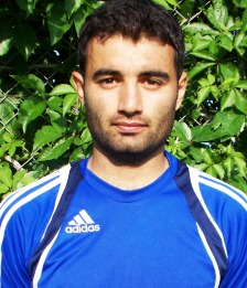 футболист Автандил Гаджиев (Азербайджан)